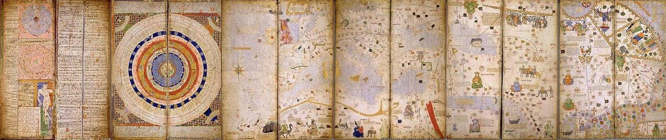 Atles Català de Cresques Abraham